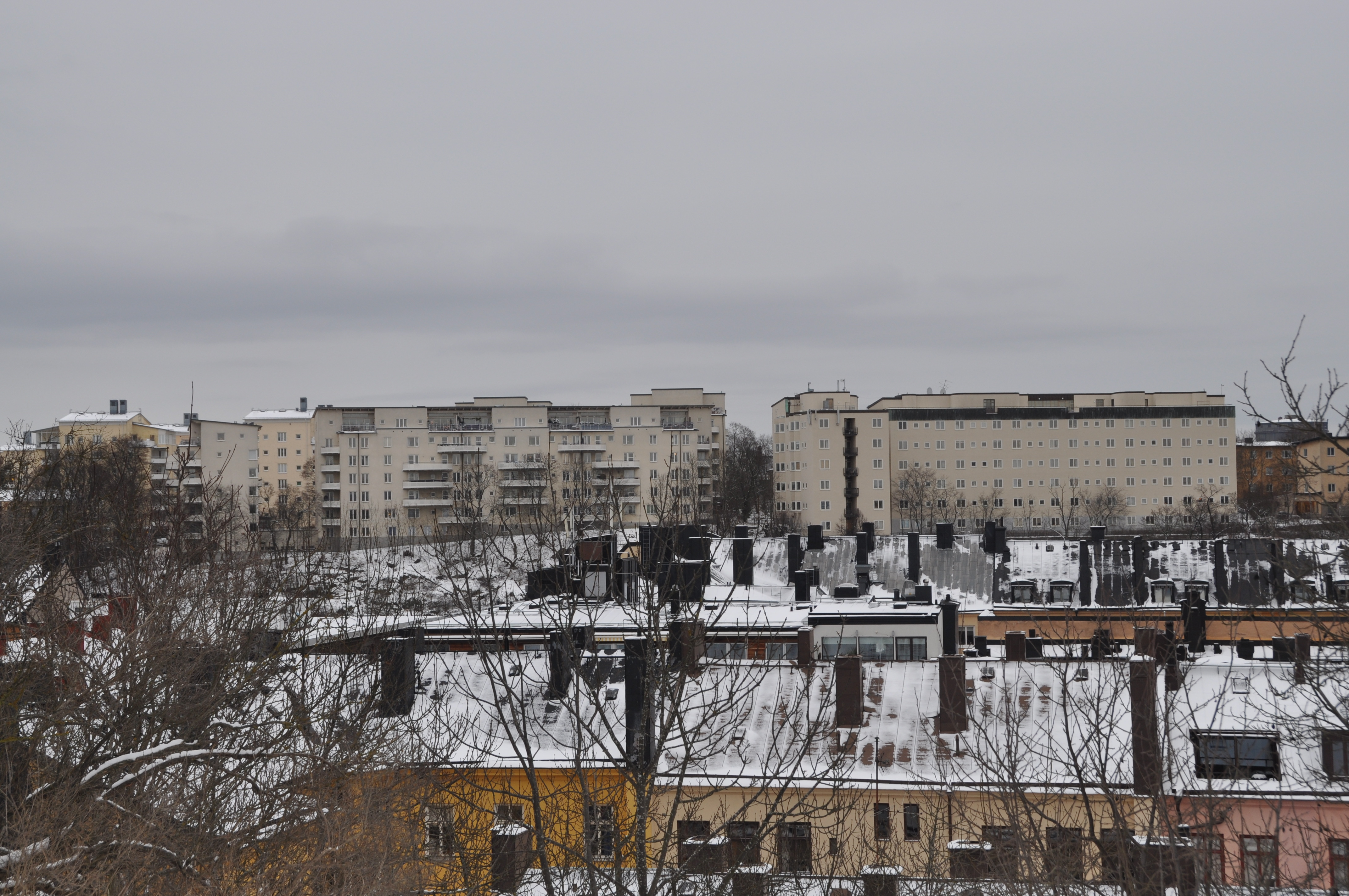 Ruddammen sett från Vanadislunden Komplexet till höger: Körsbärsvägen 19, Nybyggnadsår 1937 -1938, Axel Olsson (Byggmästare) Föreningen Engelbrektshemmet (Byggherre) Ture Ryberg (Arkitekt)